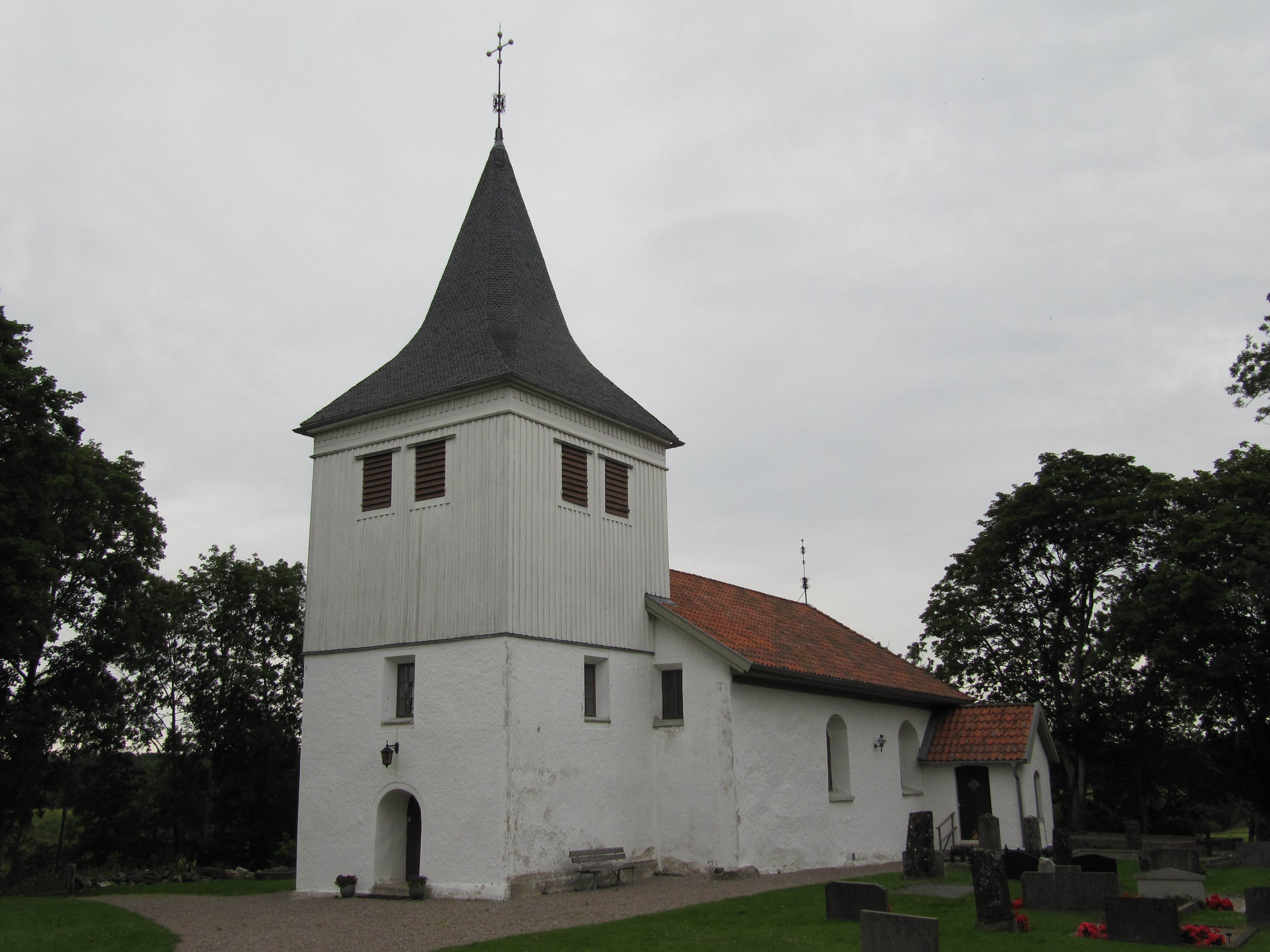 Åsbräcka kyrka